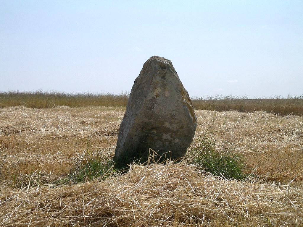 Menhir appelé "Demoiselle de Bracqueville" classé situé en plein champs à proximité de Bény-sur-Mer (Calvados) - France